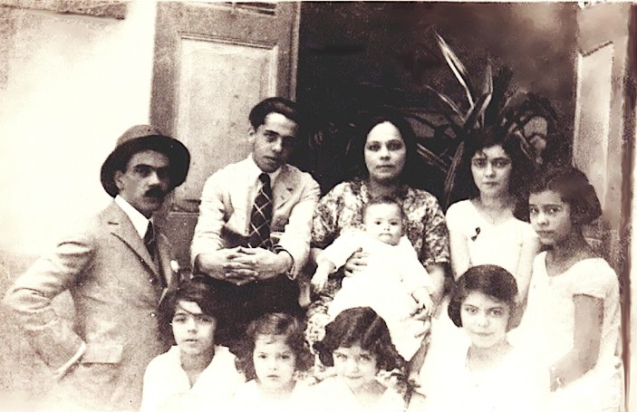 Família do Professor José Oiticica, anarquista e acadêmico de Letras.